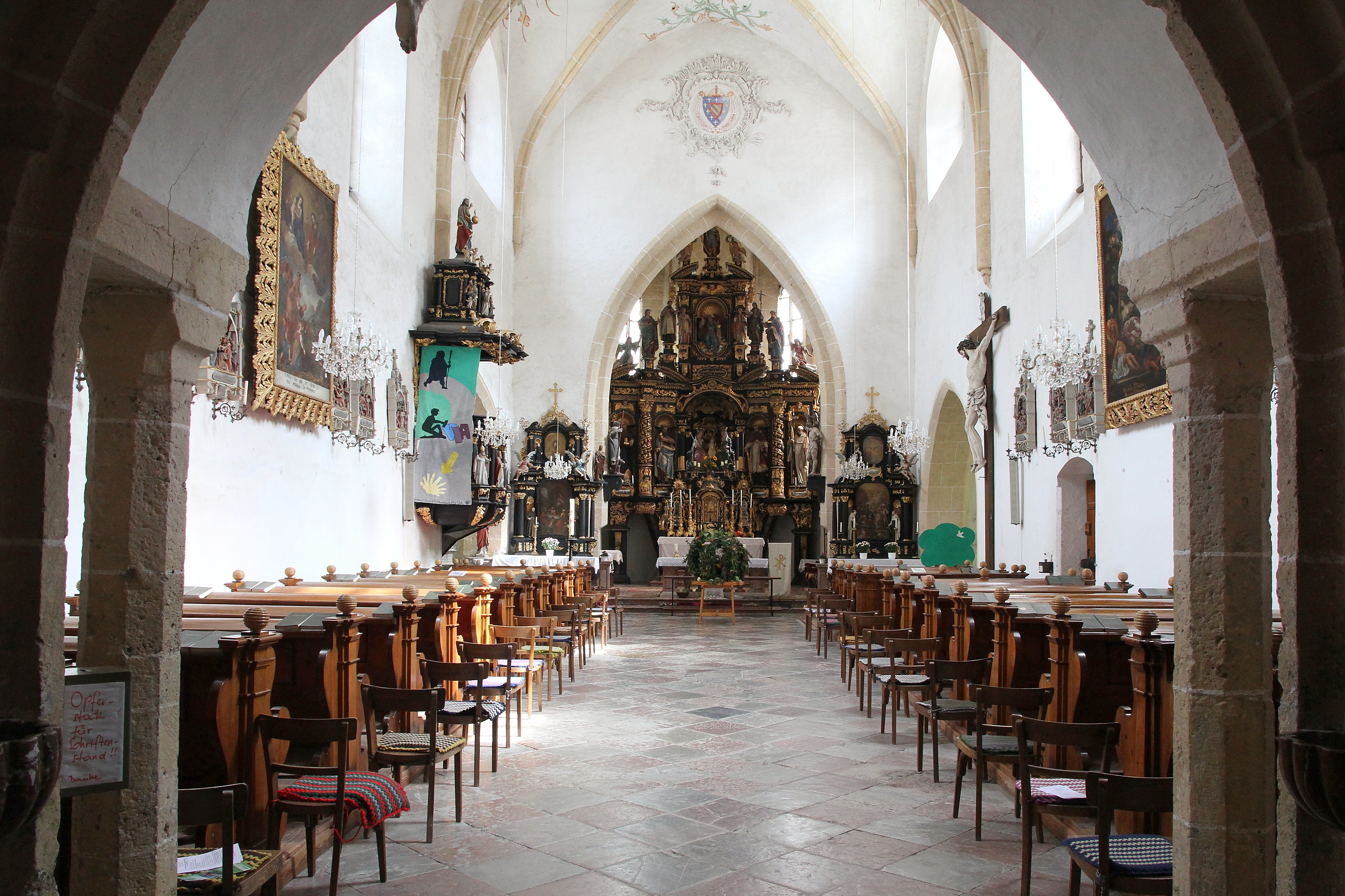 Innenansicht Richtung Chor der kath. Pfarrkirche hl. Anna in der niederösterreichischen Gemeinde Annaberg.